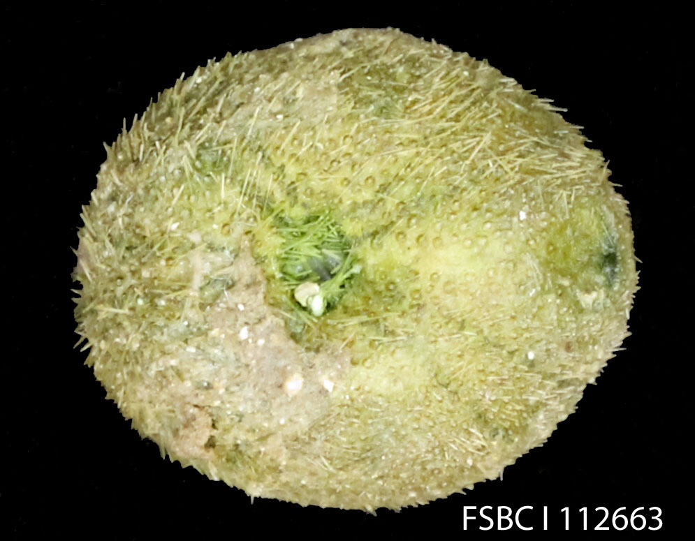 Scientific name: Brissopsis alta '